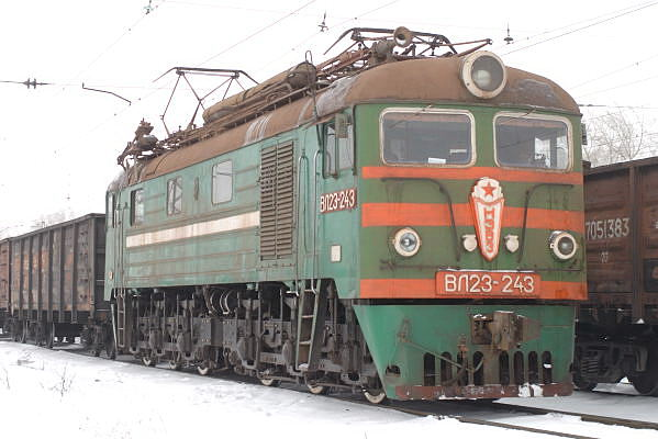 WL23-243 in Bakal